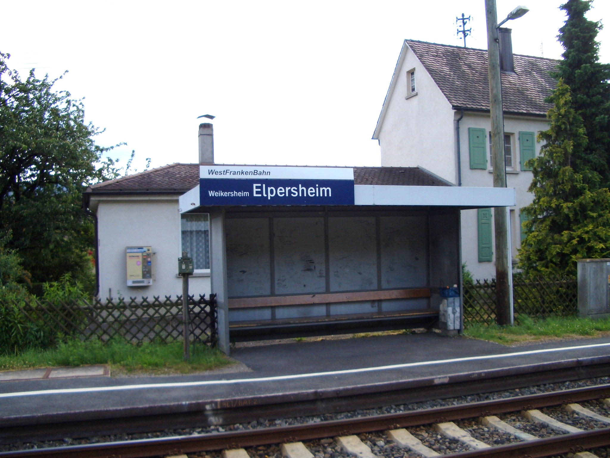 Elpersheim, Haltestelle mit Wartehäuschen. Im Hintergrund das ehem. Bahnhofsgebäude